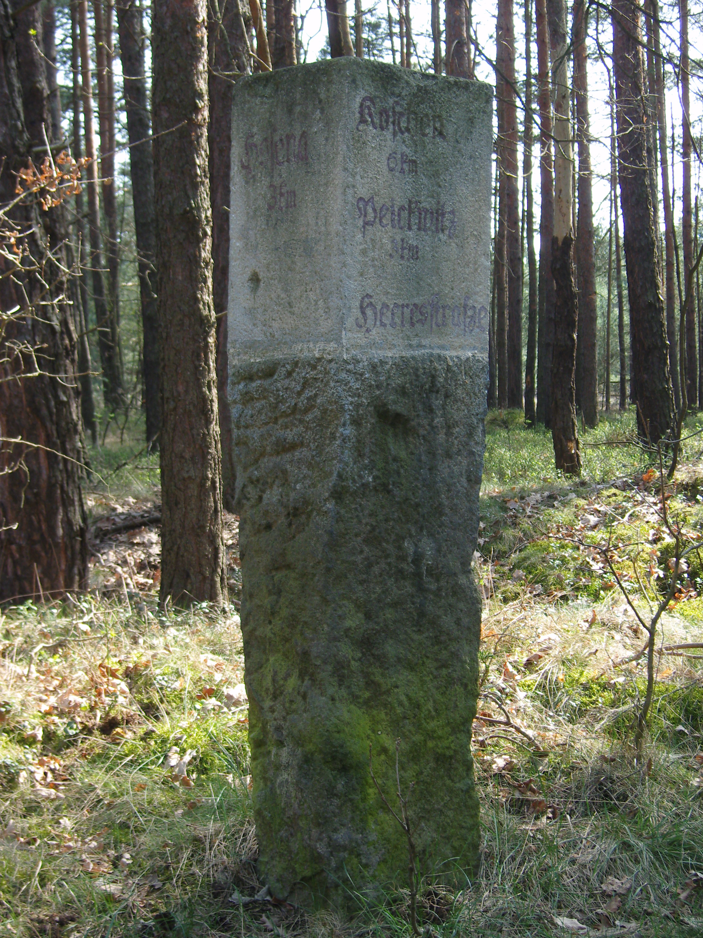 Steinerner Wegweiser an der alten Straße von Peickwitz nach Niemtsch, Baudenkmal in Senftenberg